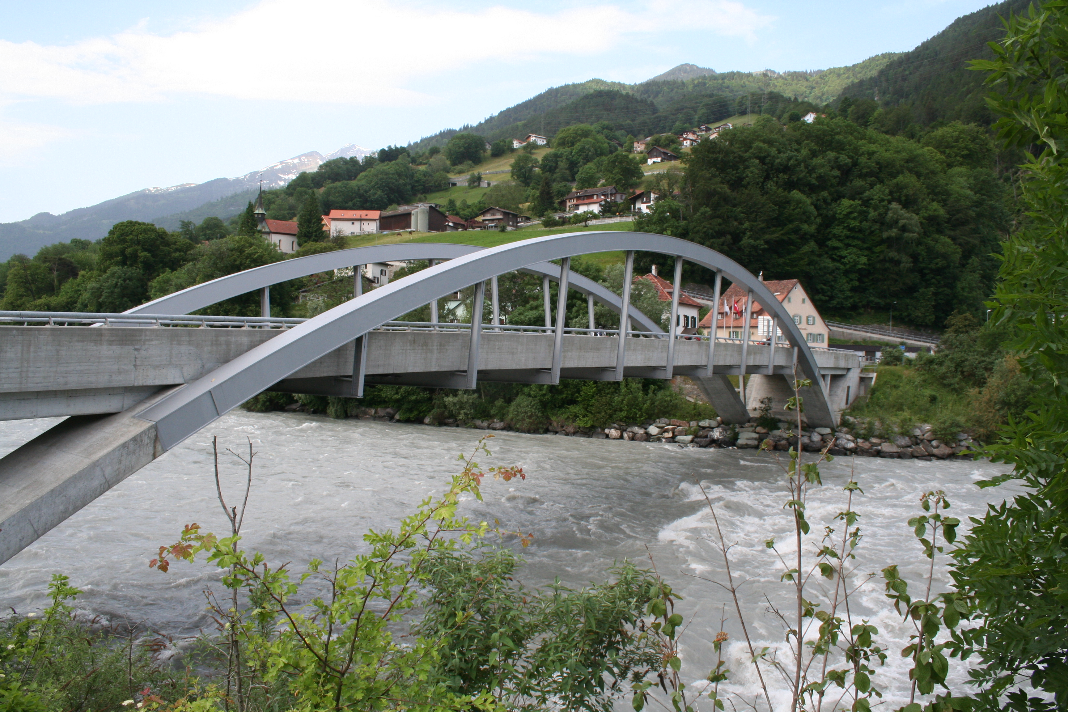 Tardisbrücke Richtung Mastrils